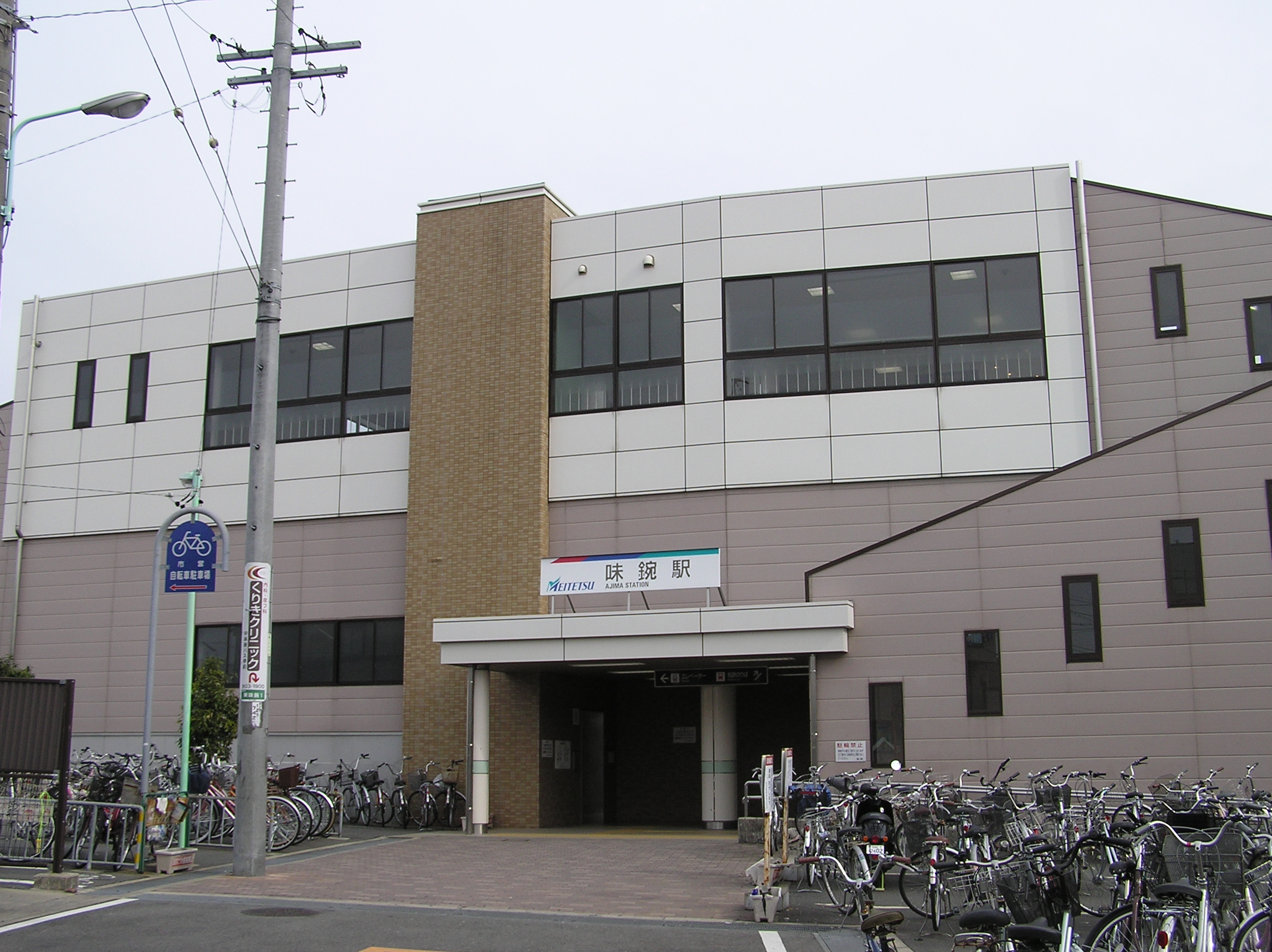 名古屋鉄道 小牧線 味鋺駅